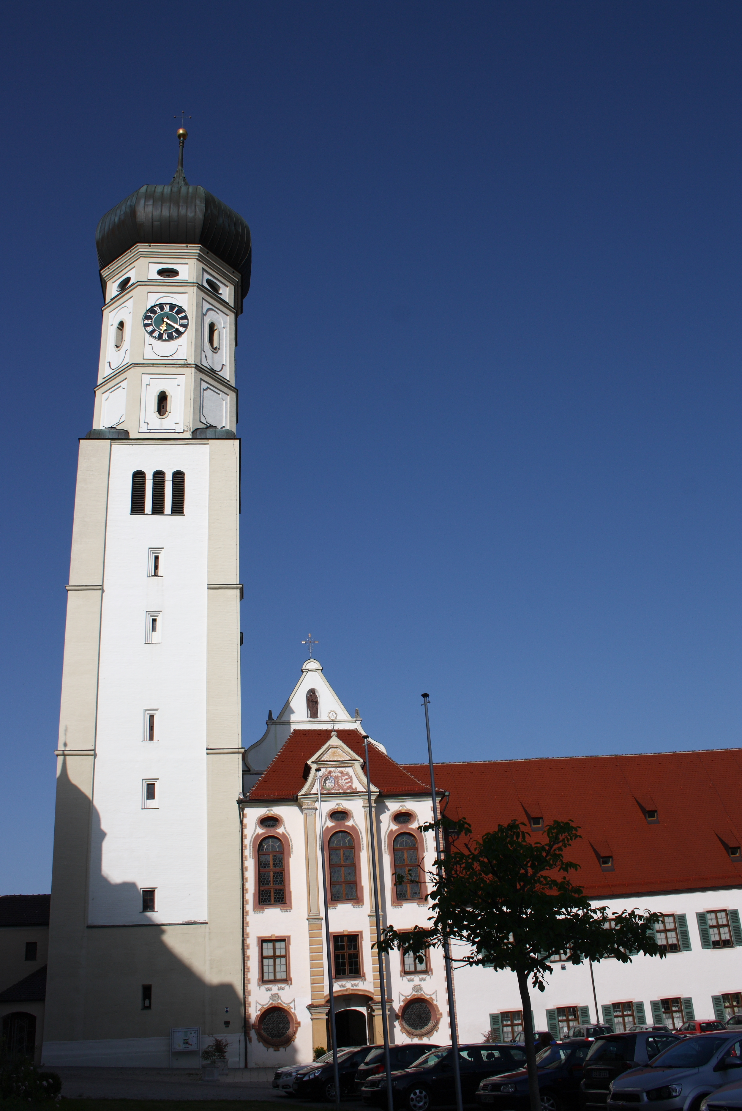 Katholische Pfarrkirche St. Johannes Evangelist und Petrus, ehemalige Klosterkirche des Prämonstratenserklosters Klosters Ursberg in Ursberg im Landkreis Günzburg (Bayern), Turm und Westfassade